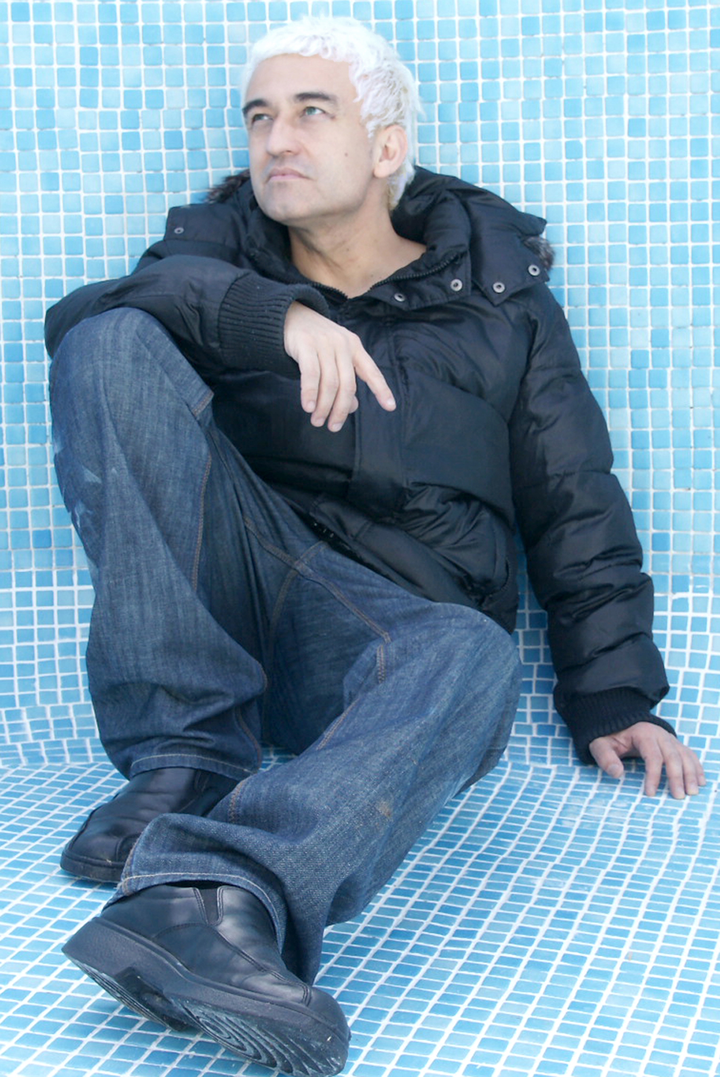 Jorge González Ríos, músico chileno